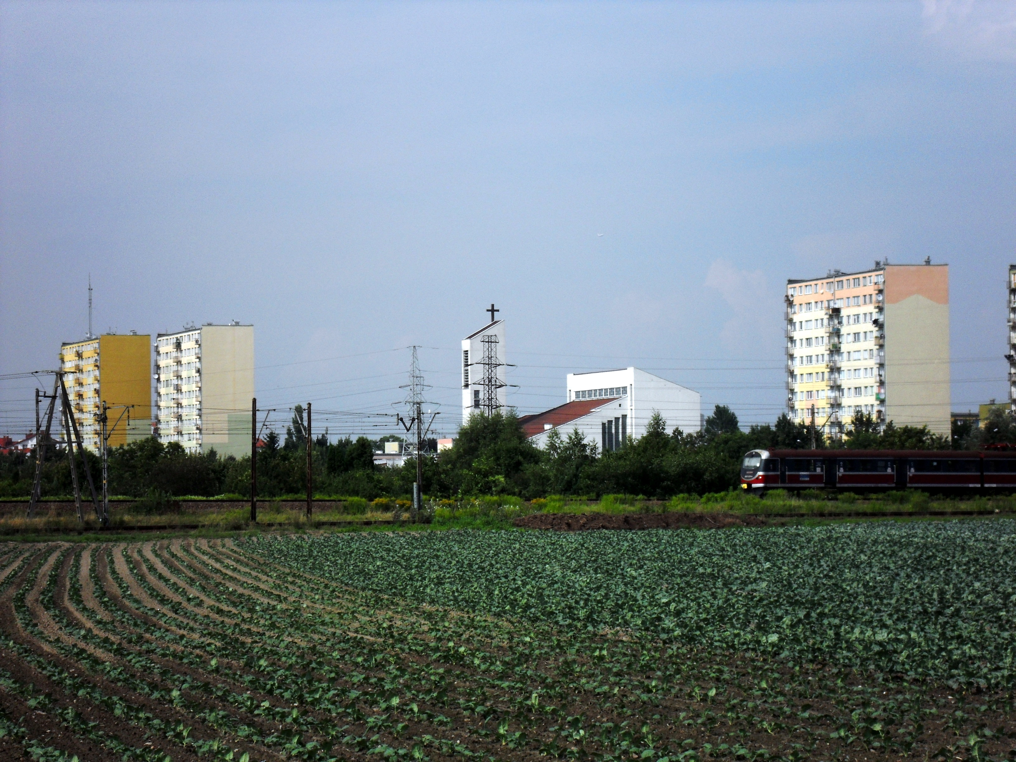 Kościół na osiedlu Niedźwiadek w Ursusie widziany z ul. Witosa w Piastowie